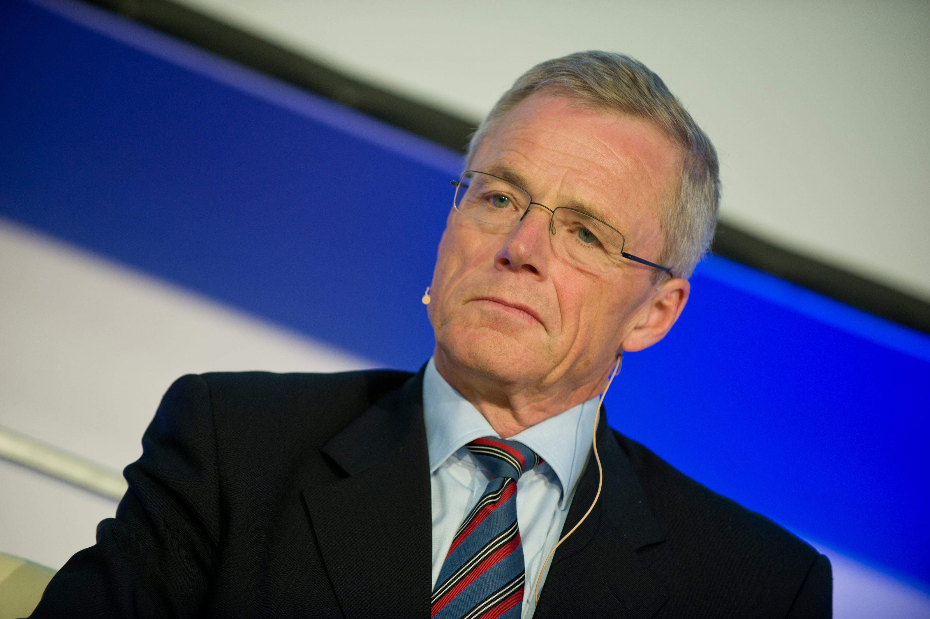 © Evgenia Levin